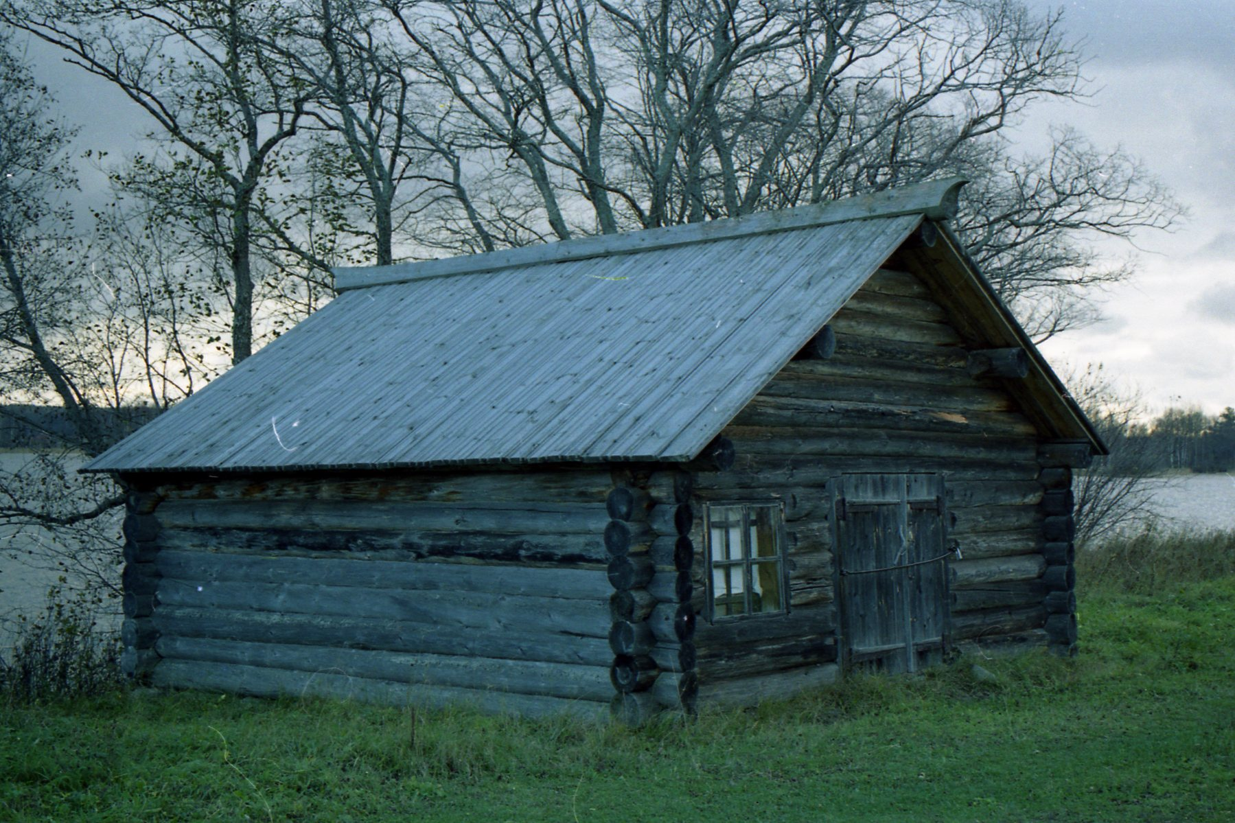 Кузница из д. Суйсарь (Республика Карелия, Медвежьегорск, о. Кижи, музей-заповедник деревянного зодчества)